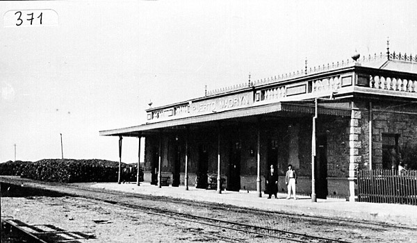 Edificio de la est Madryn